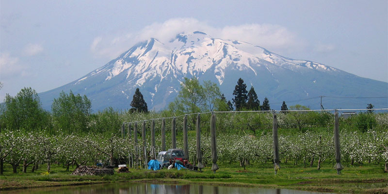 Iwakisan, in Hirosaki and Ajigasawa, Aomori, Japan. (see from Hirosaki)